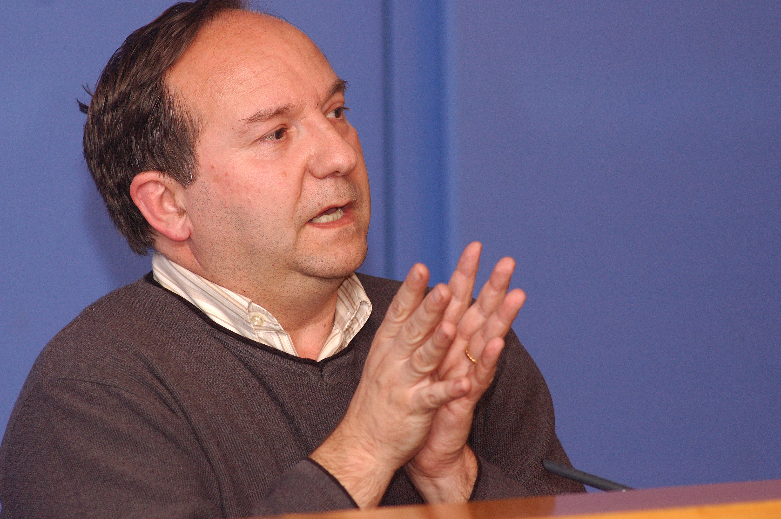 Llorenç Ferrer al MHC el 2004.